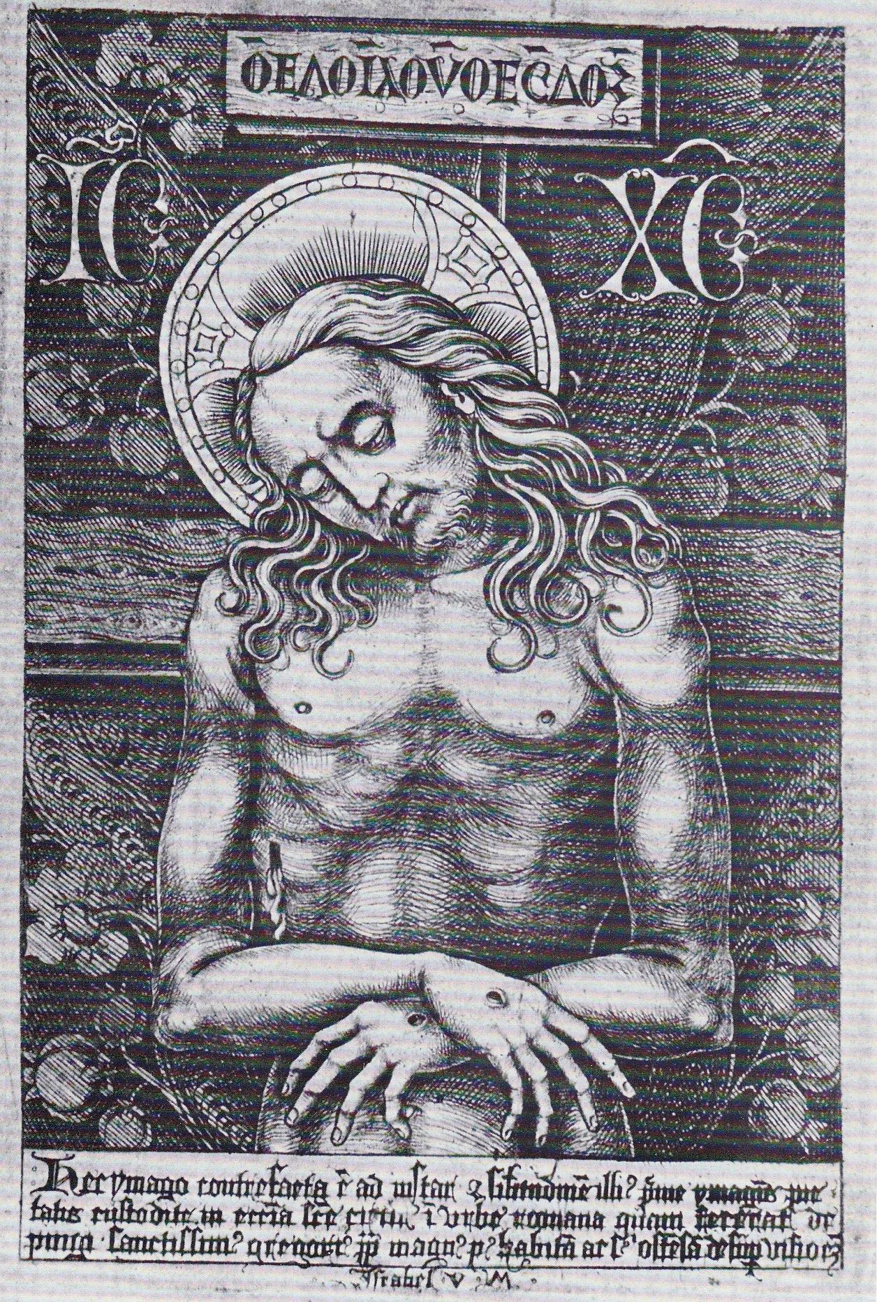 Israhel van Meckenem: Schmerzensmann, imago pietatis, Kupferstich um 1495. Nachbildung der Mosaikikone imago pietatis in Santa Croce in Gerusalemme, Rom.